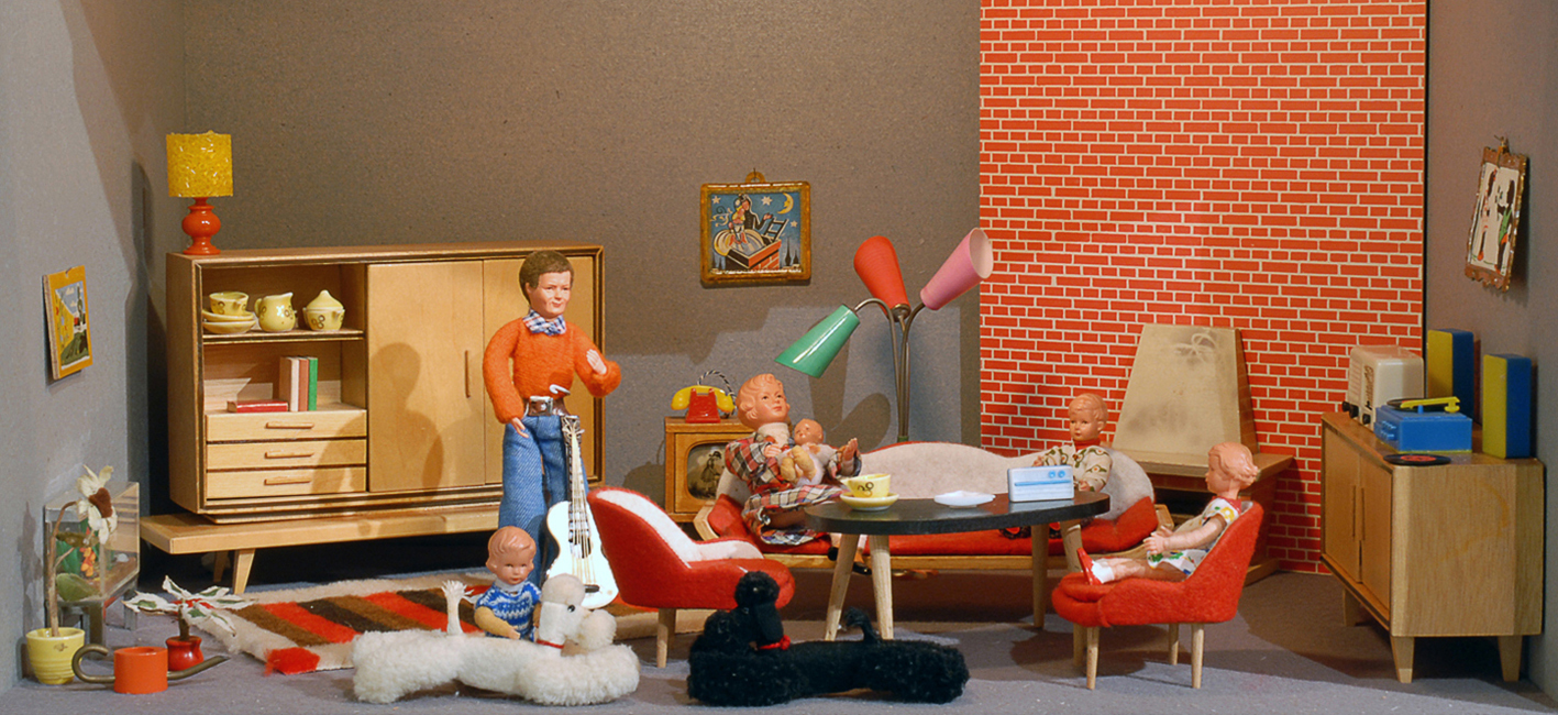 Schweizer Kindermuseum: Puppenstuben aus der Moderne